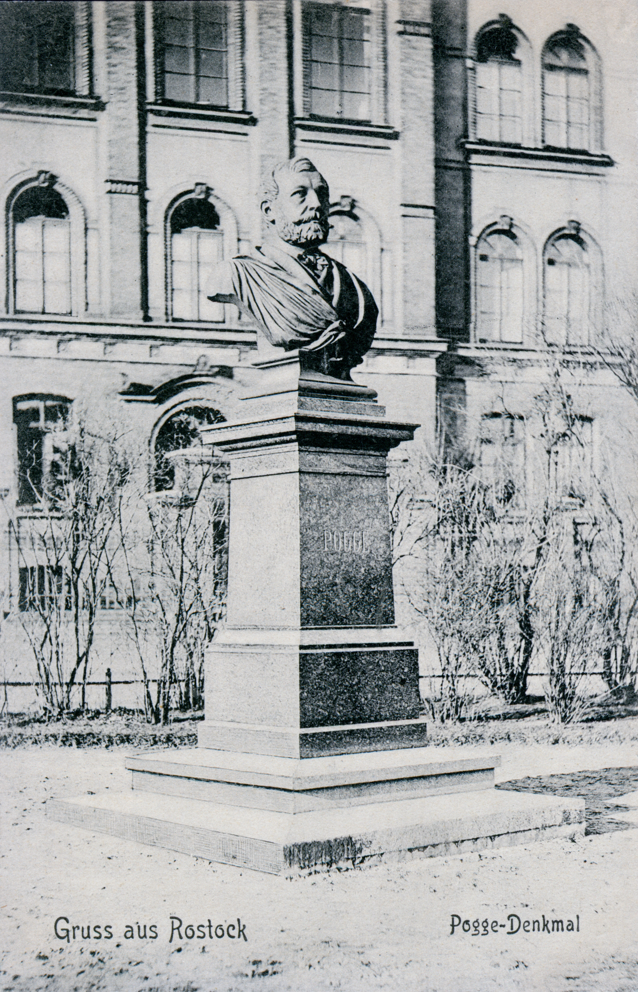 Denkmal für den Forschungsreisenden Paul Pogge in Rostock, im Rosengarten vor dem Ständehaus; geschaffen 1885 von Bildhauer Ludwig Brunow; 1901 zum Leibnizplatz transloziert, dort 1945 abgebaut und später zerstört